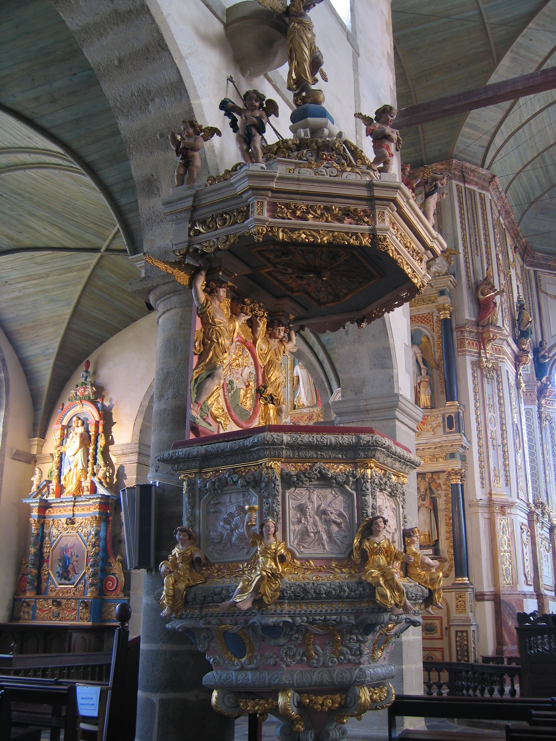 Saint-Thégonnec Eglise la chaire